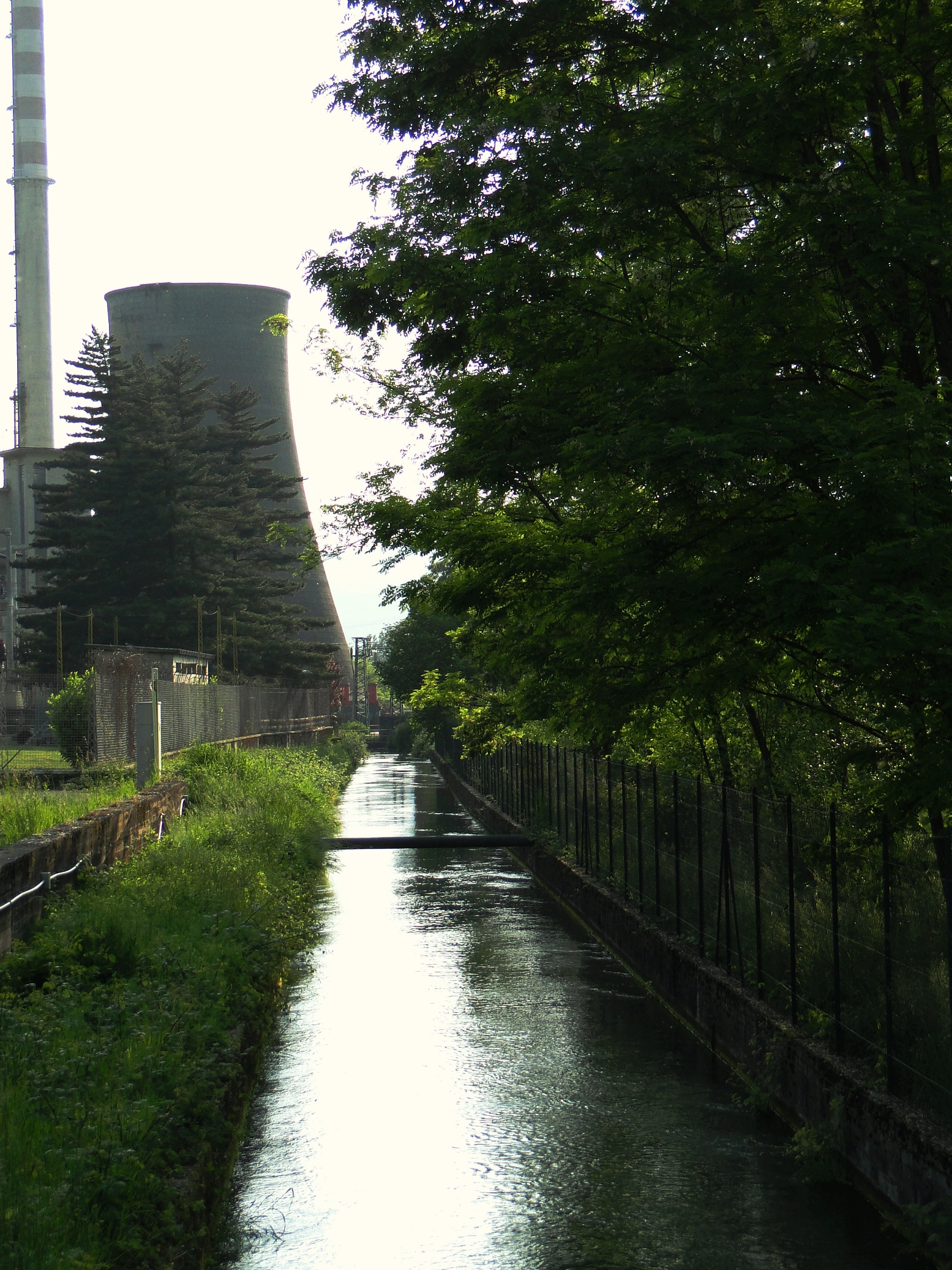 Villa di Serio (BG), centrale idroelettrica Italgen e roggia Borgogna